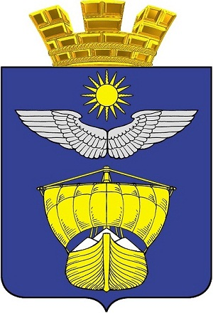 Новый герб (2012 год) муниципального образования "город Ахтубинск"